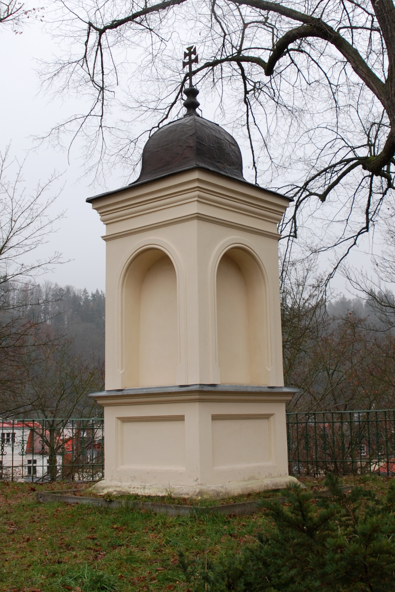 Kaple svatého Vavřince v Karlových Varech